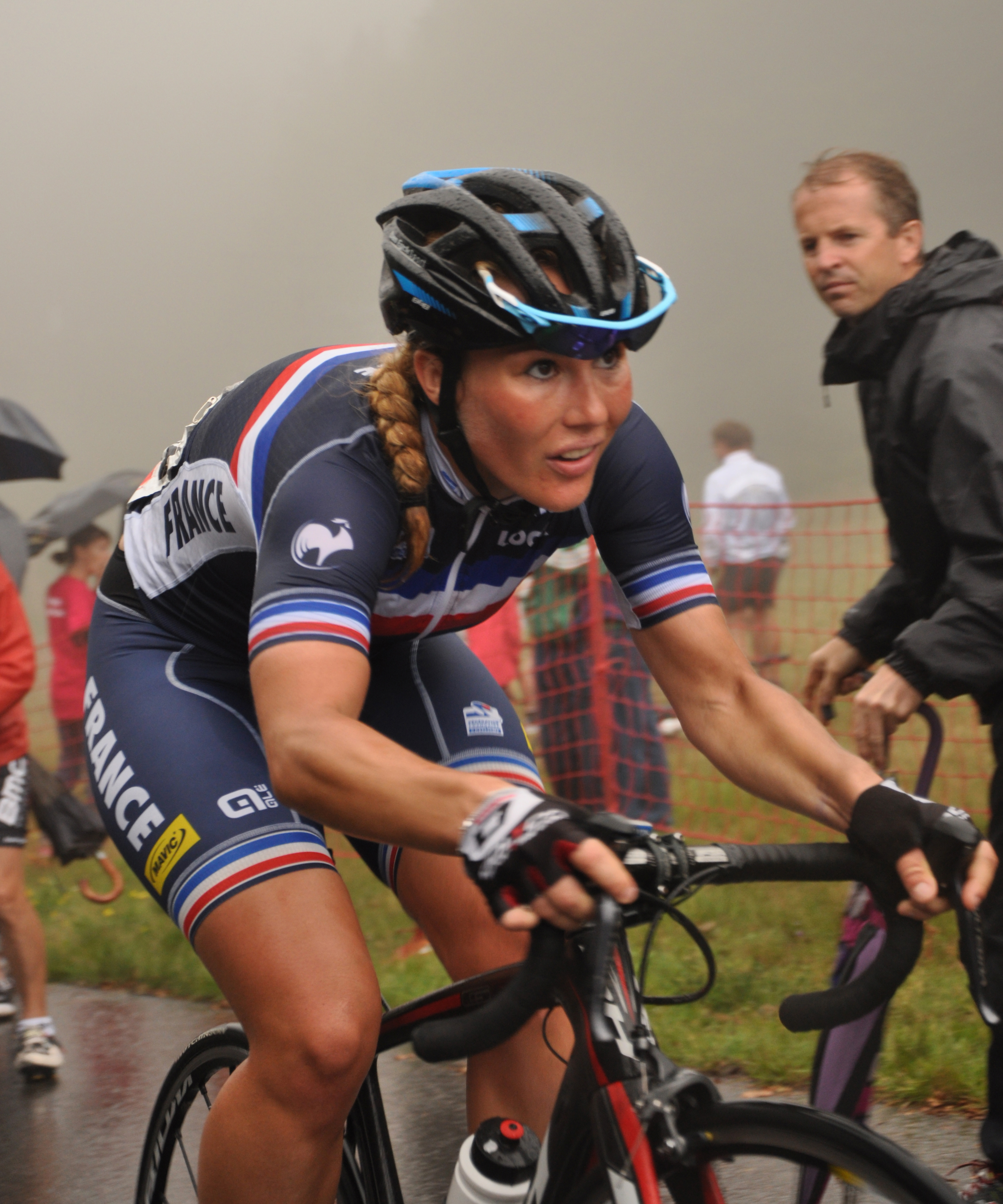 Fiona Dutriaux - Planche des Belles Filles - Route de France féminine